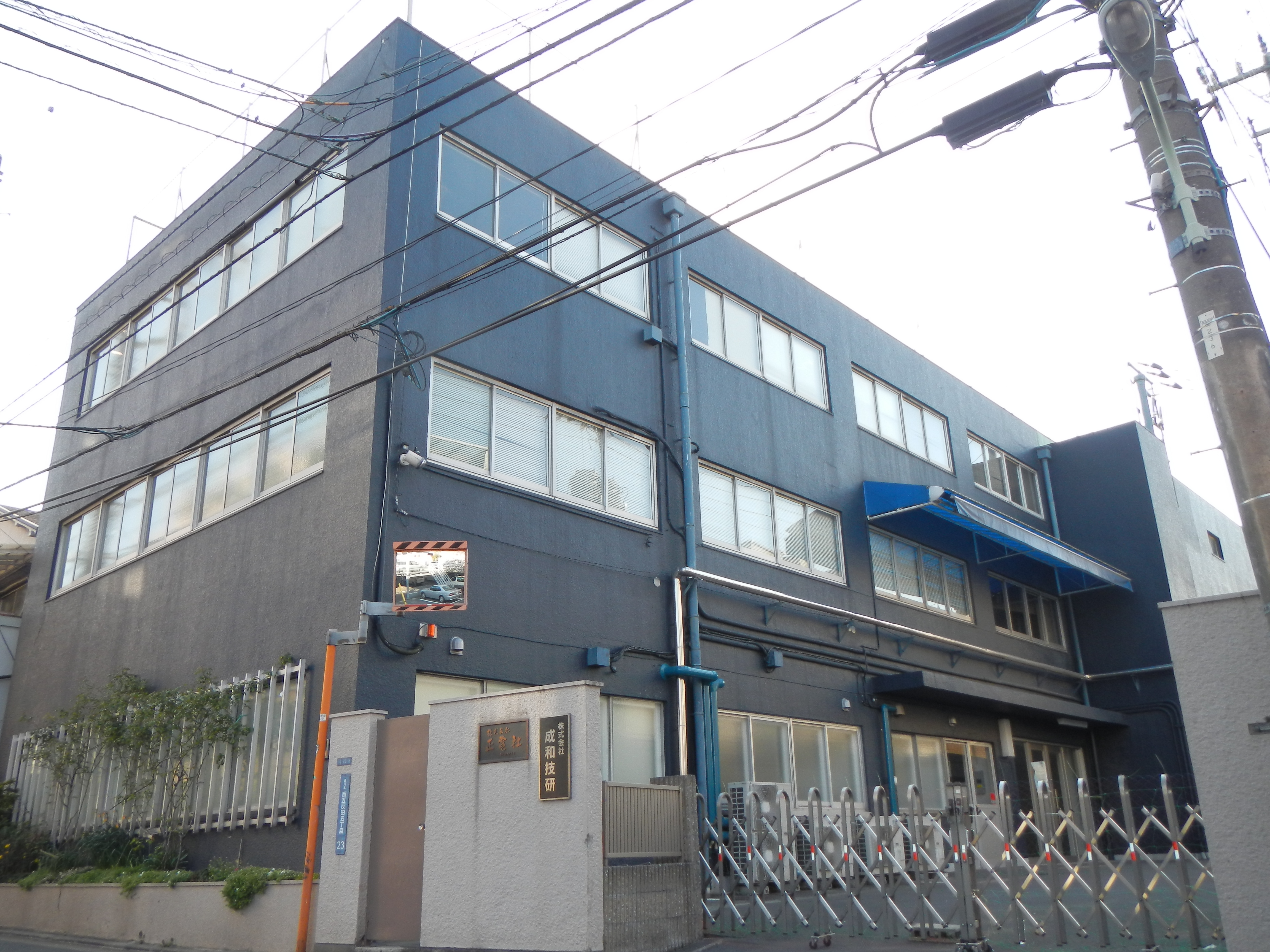 正電社 本社（東京都品川区西五反田）